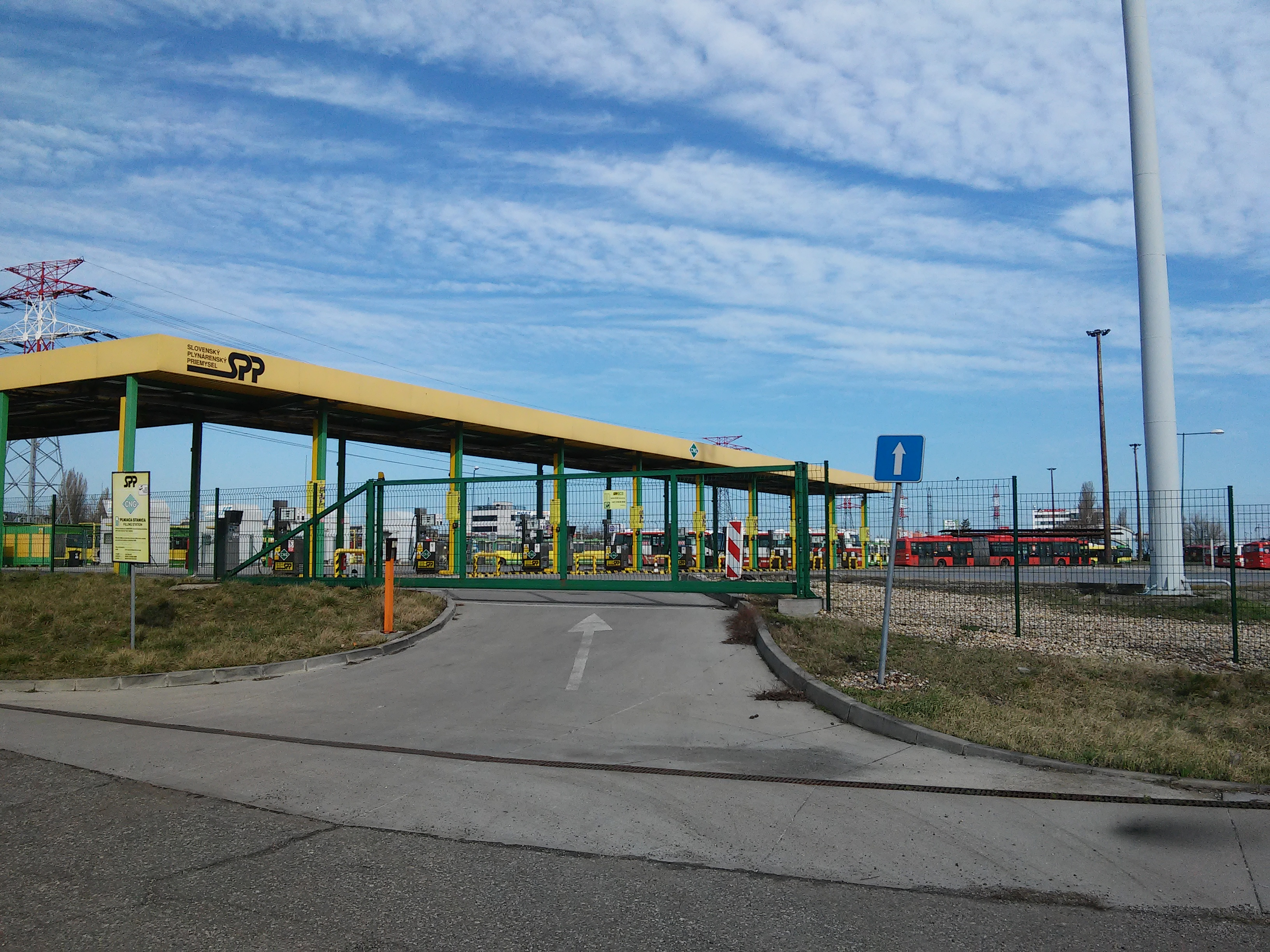 Jurajov dvor